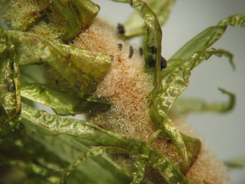 Gewelltblättriges Gabelzahnmoos (Dicranum polysetum), Rhizoidfilz, 30x vergrößert